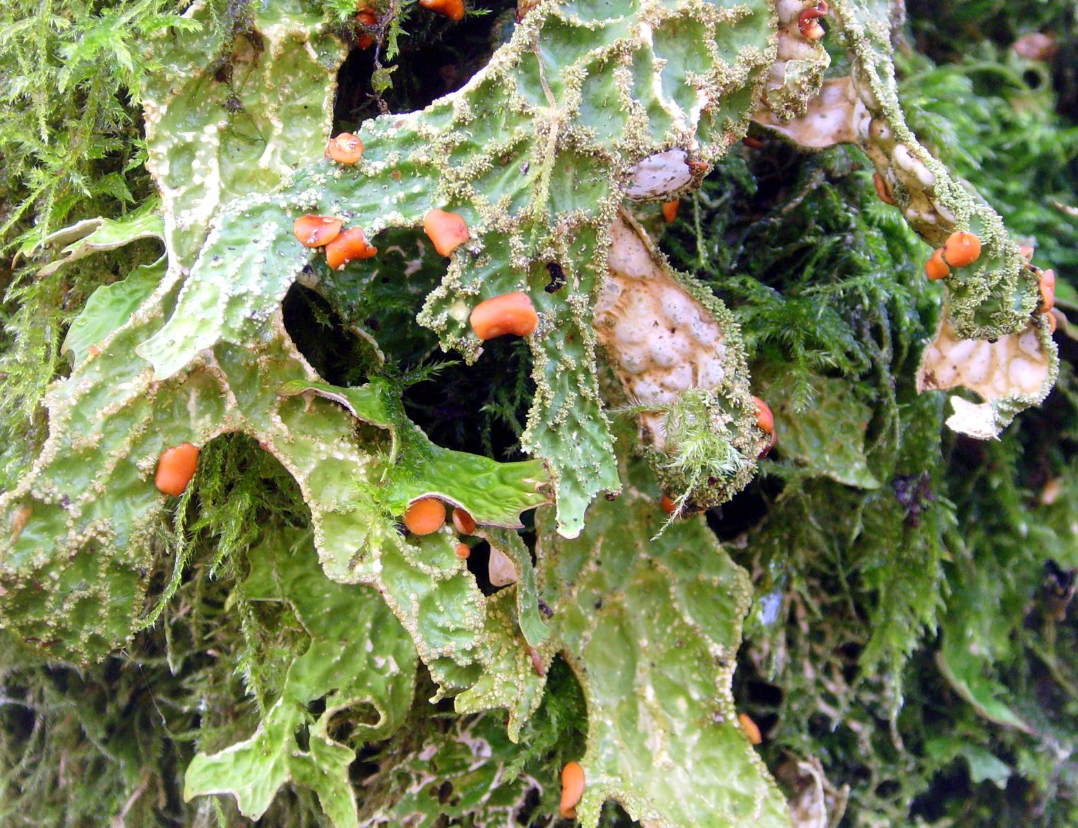 Lobaria pulmonaria fertile, Pont Grayo (Berné, Morbihan, Bretagne, France)